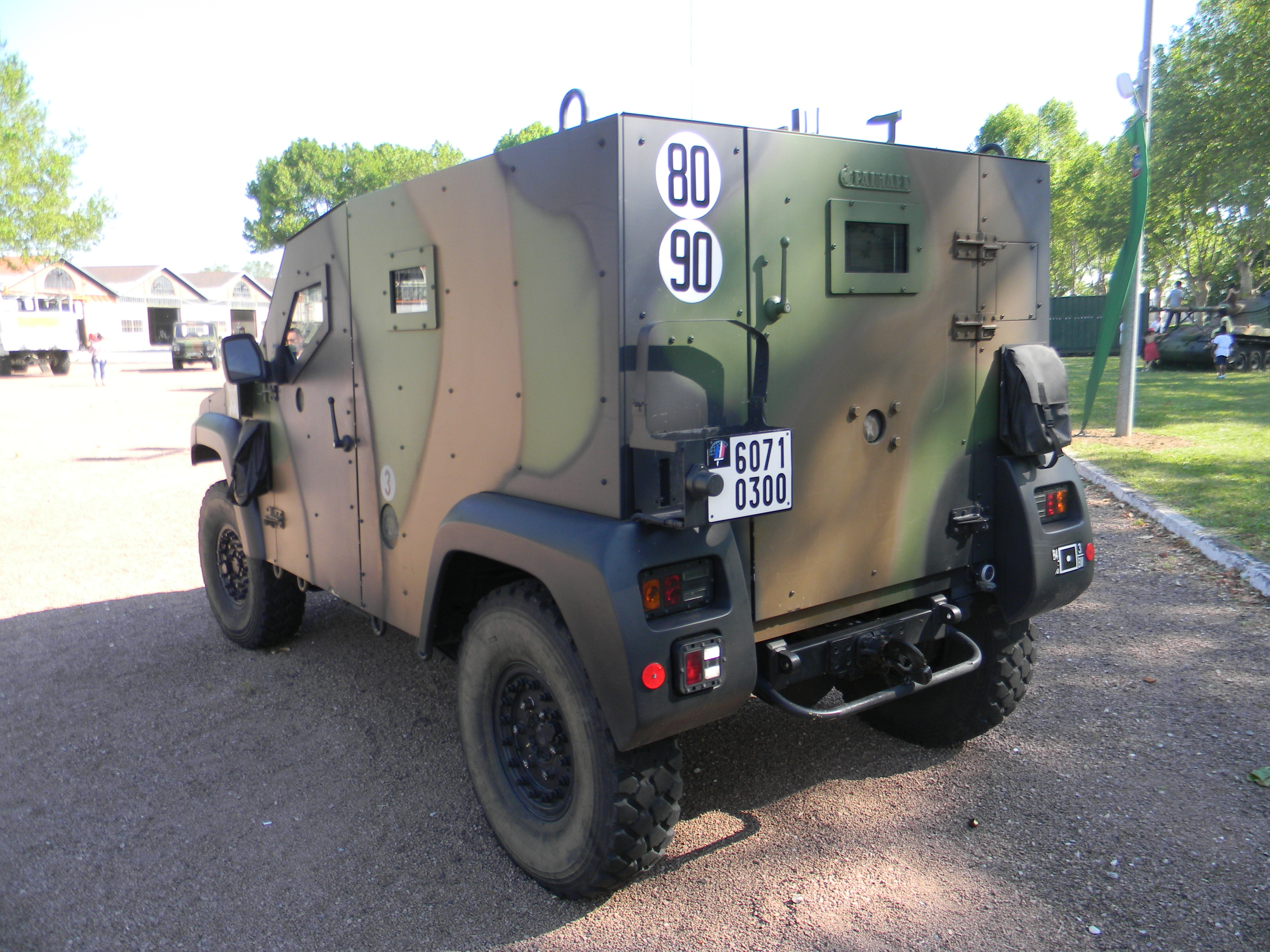 Journées portes ouvertes du quartier général Sabatier à Lyon le 15 et 16 juin 2013.